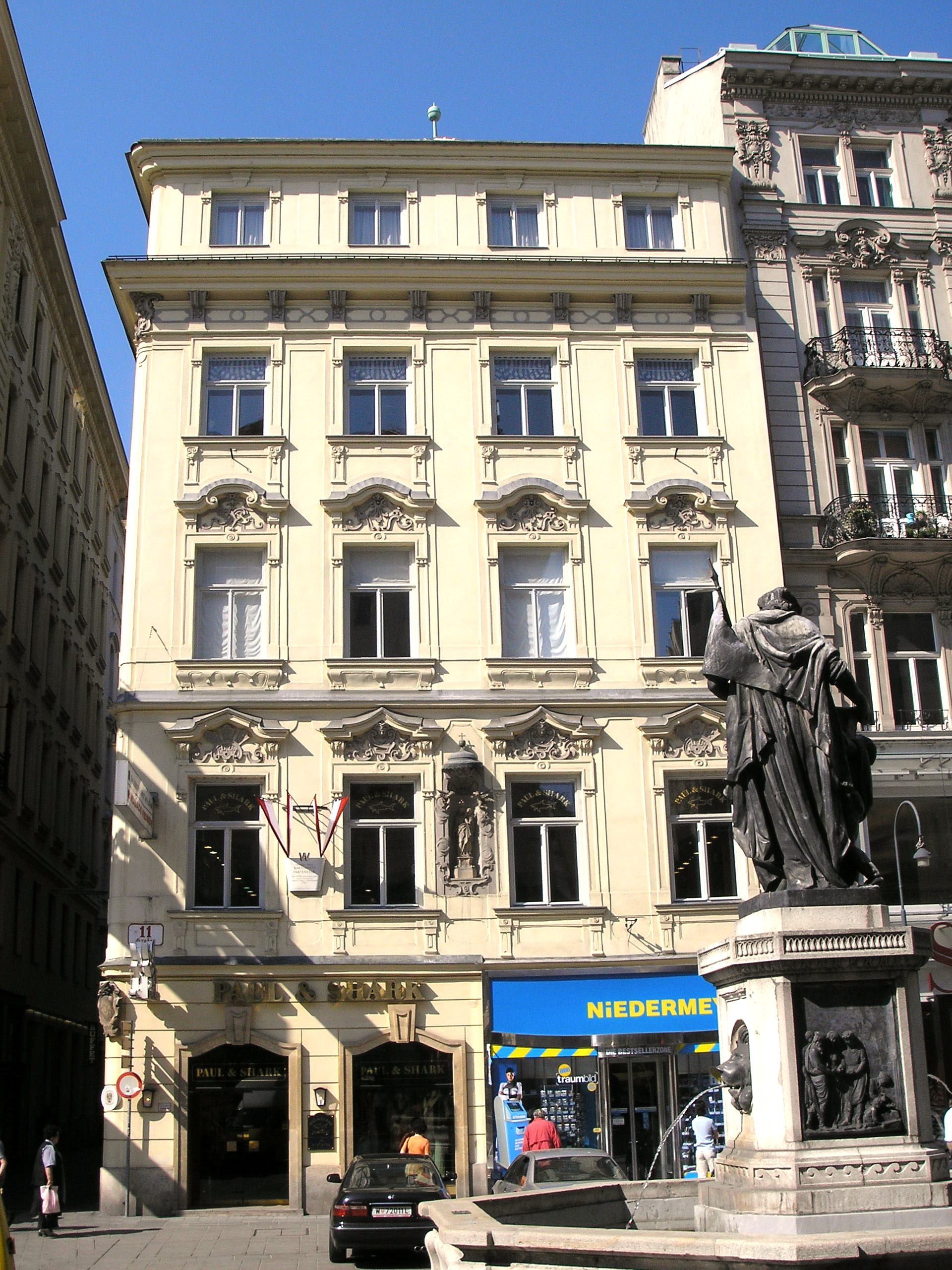 Palais Bartolotti-Partenfeld in Vienna, at Graben, Leopoldsbrunnen